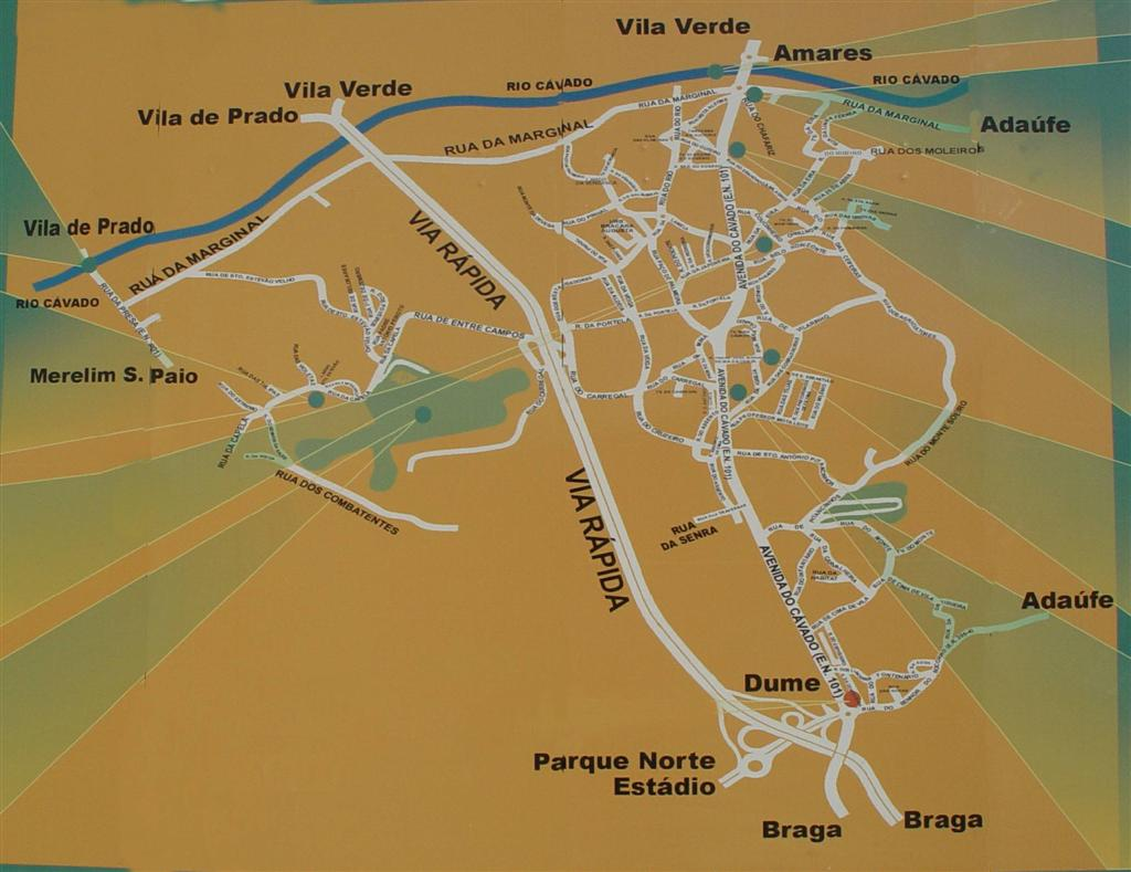 Mapa da freguesia de Palmeira